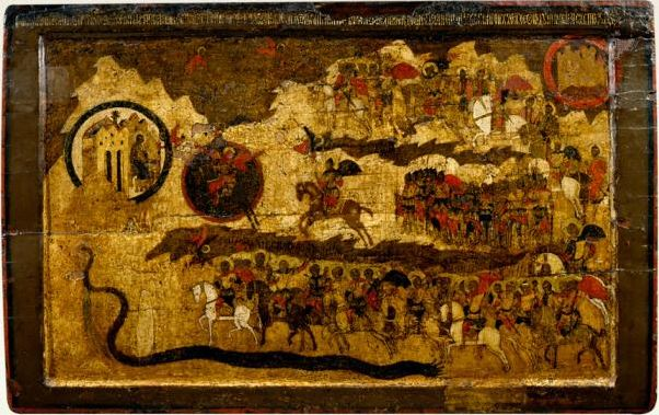 Икона "Благословенно воинство Небесного Царя". Происходит из усыпальницы великого князя Сергея Александровича в Чудовом монастыре Московского Кремля